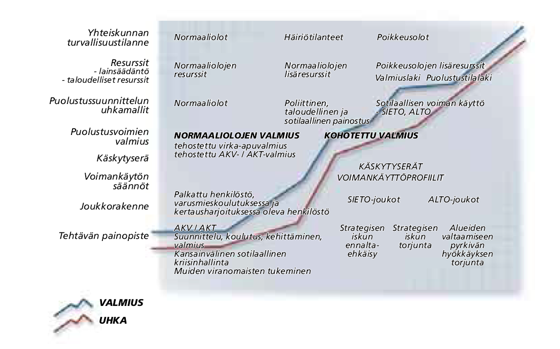 Suomen puolustusvoimien valmiudenkohottamisjärjestelmä